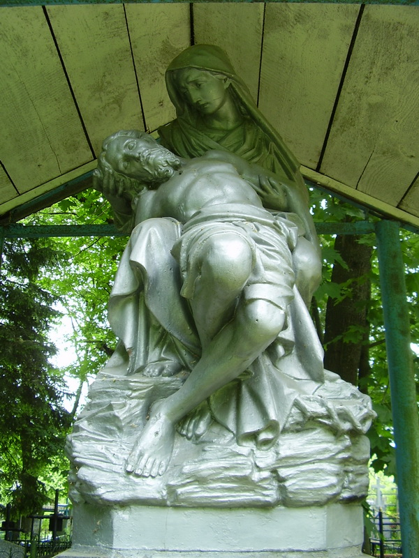 Вуглы (Барысаўскі раён, Барысаў). Каталіцкія могілкі Кальварыя